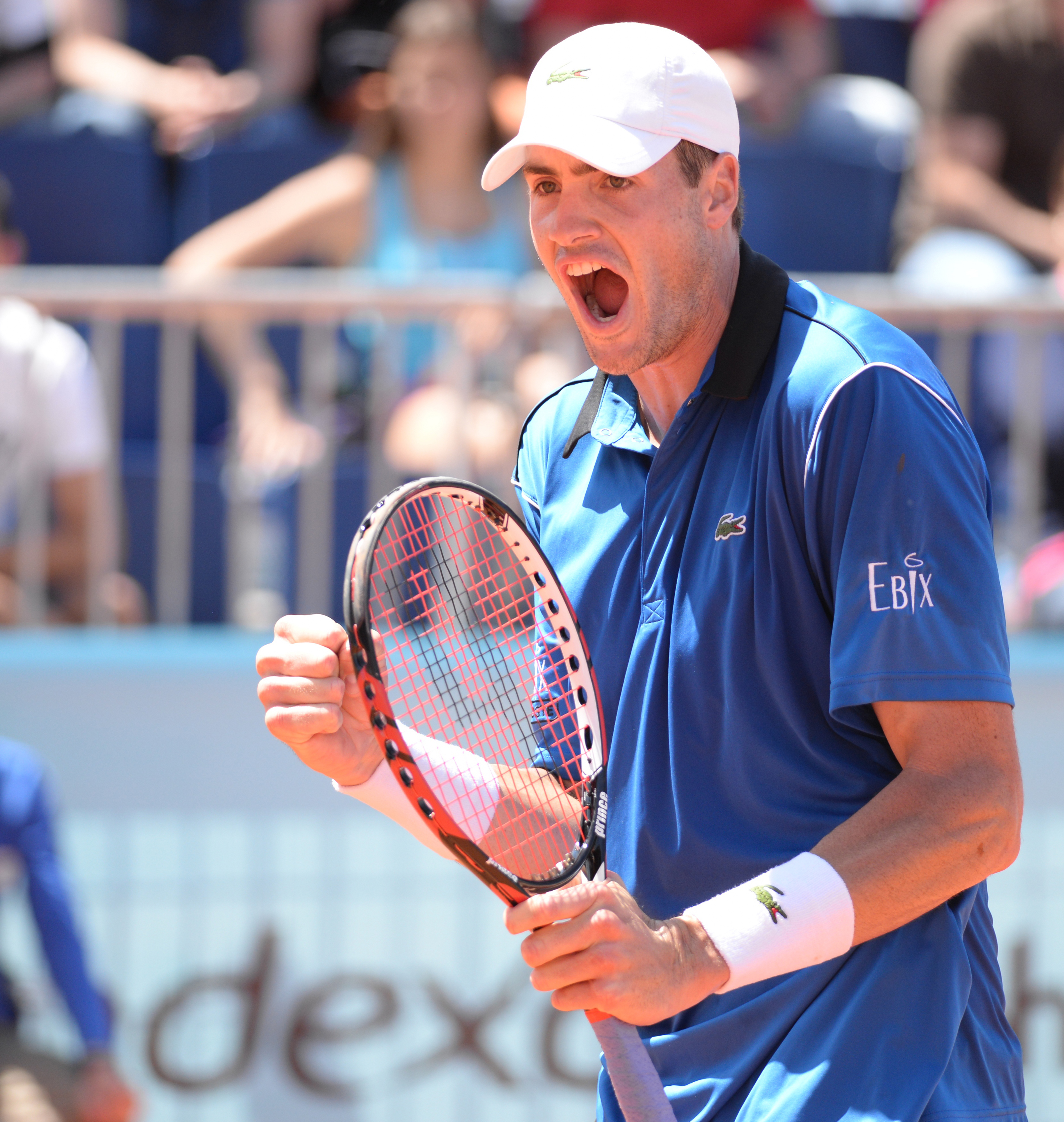 John Isner